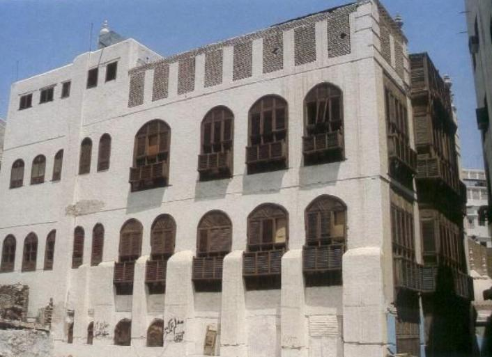 صورة لمبنى المدرسة الصولتية من الخلف.